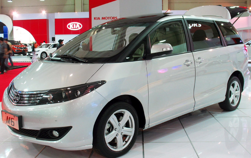 BYD M6 2010